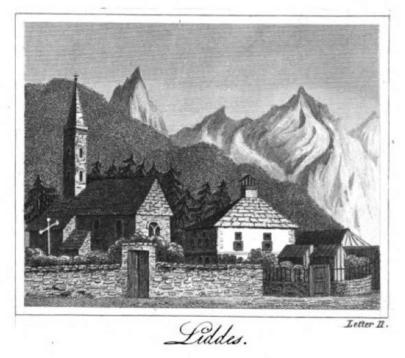 Liddes